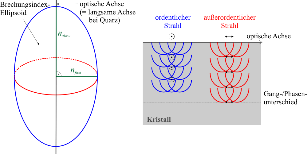 Brechungsindex-Ellipsoid bei Wellenplatten